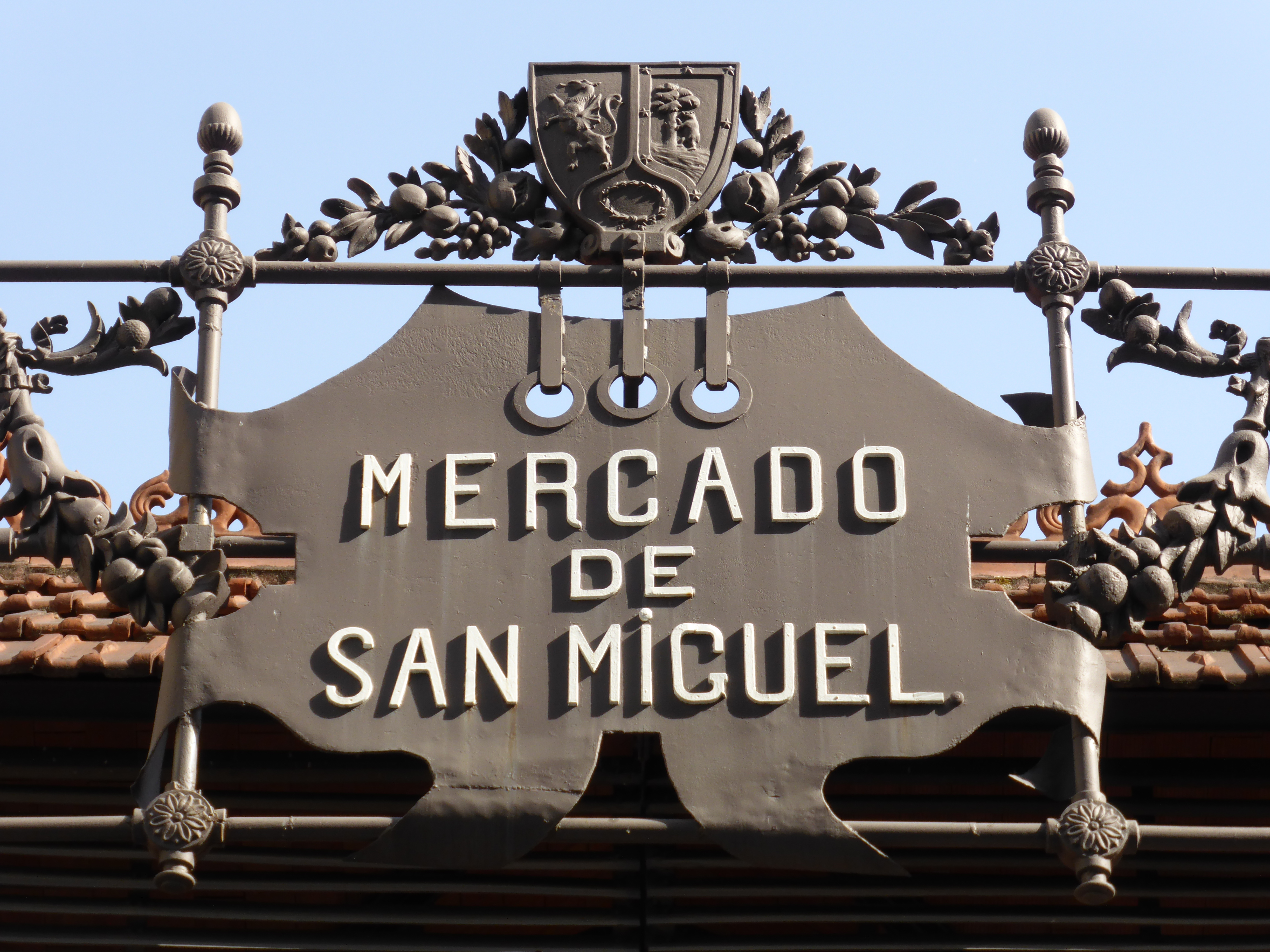 Rótulo con el nombre del mercado, en lo alto de una fachada lateral. Este mercado es de estructura de hierro.